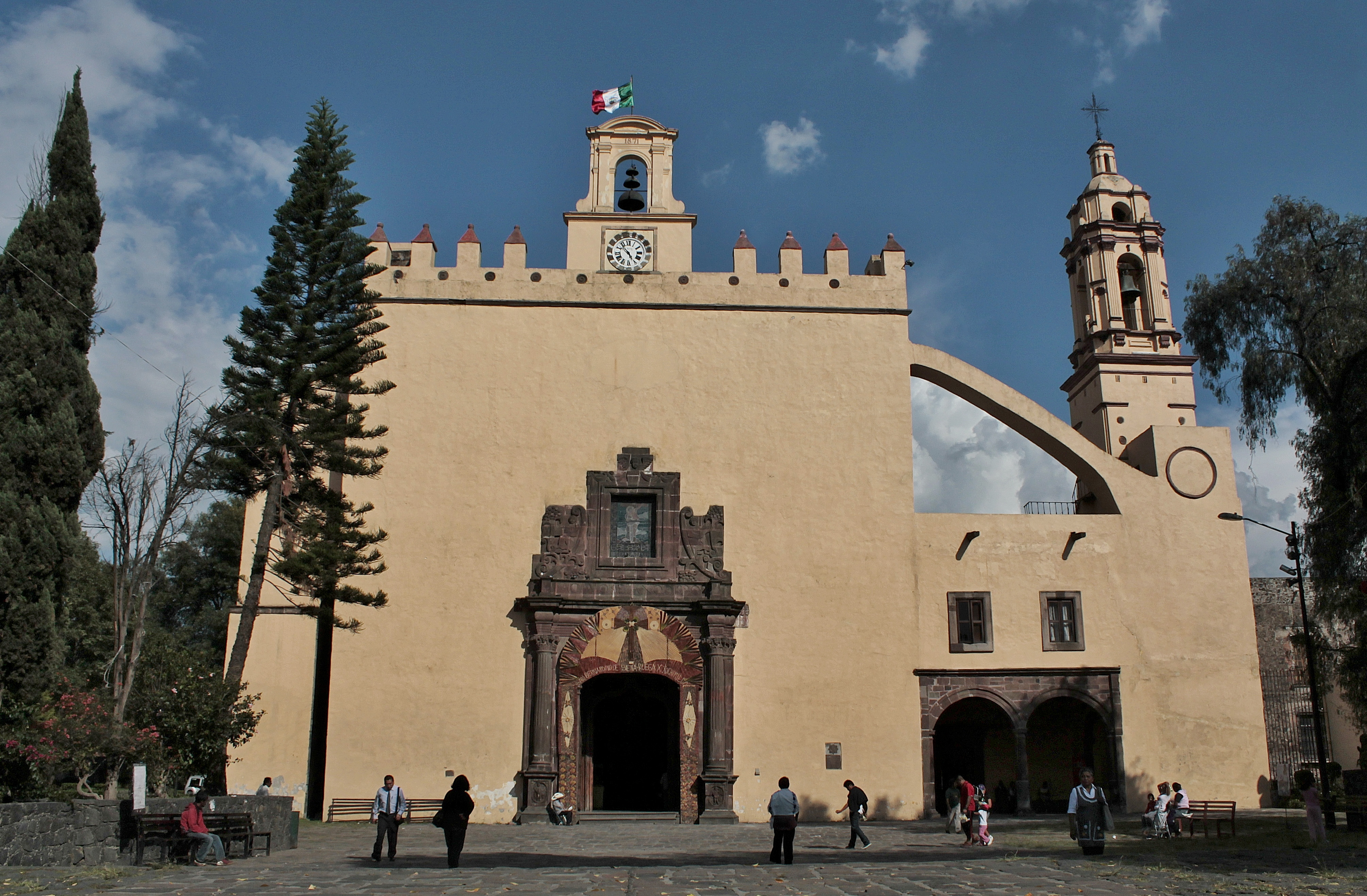 Delegación Xochimilco, Centro